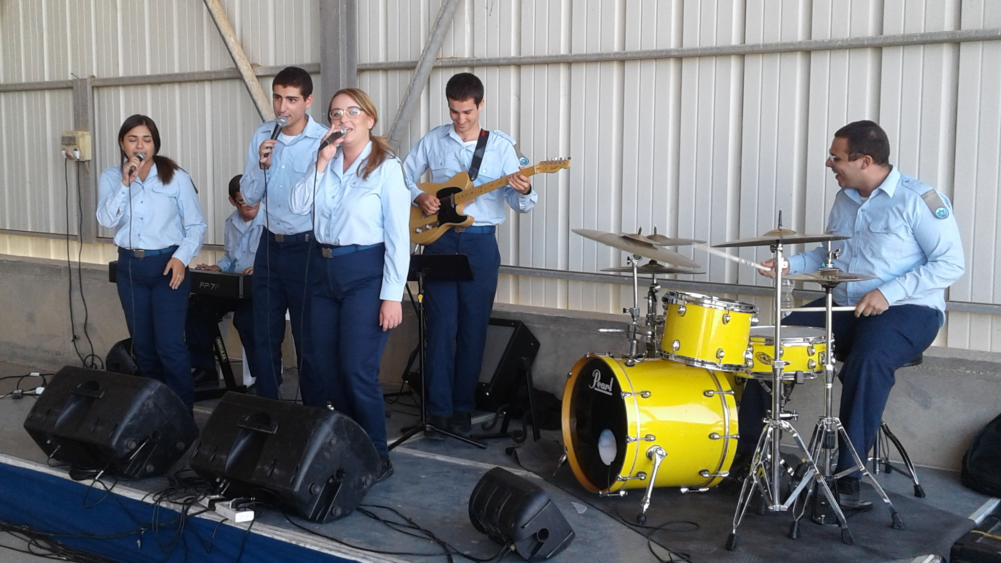 להקת חיל האוויר, 2016